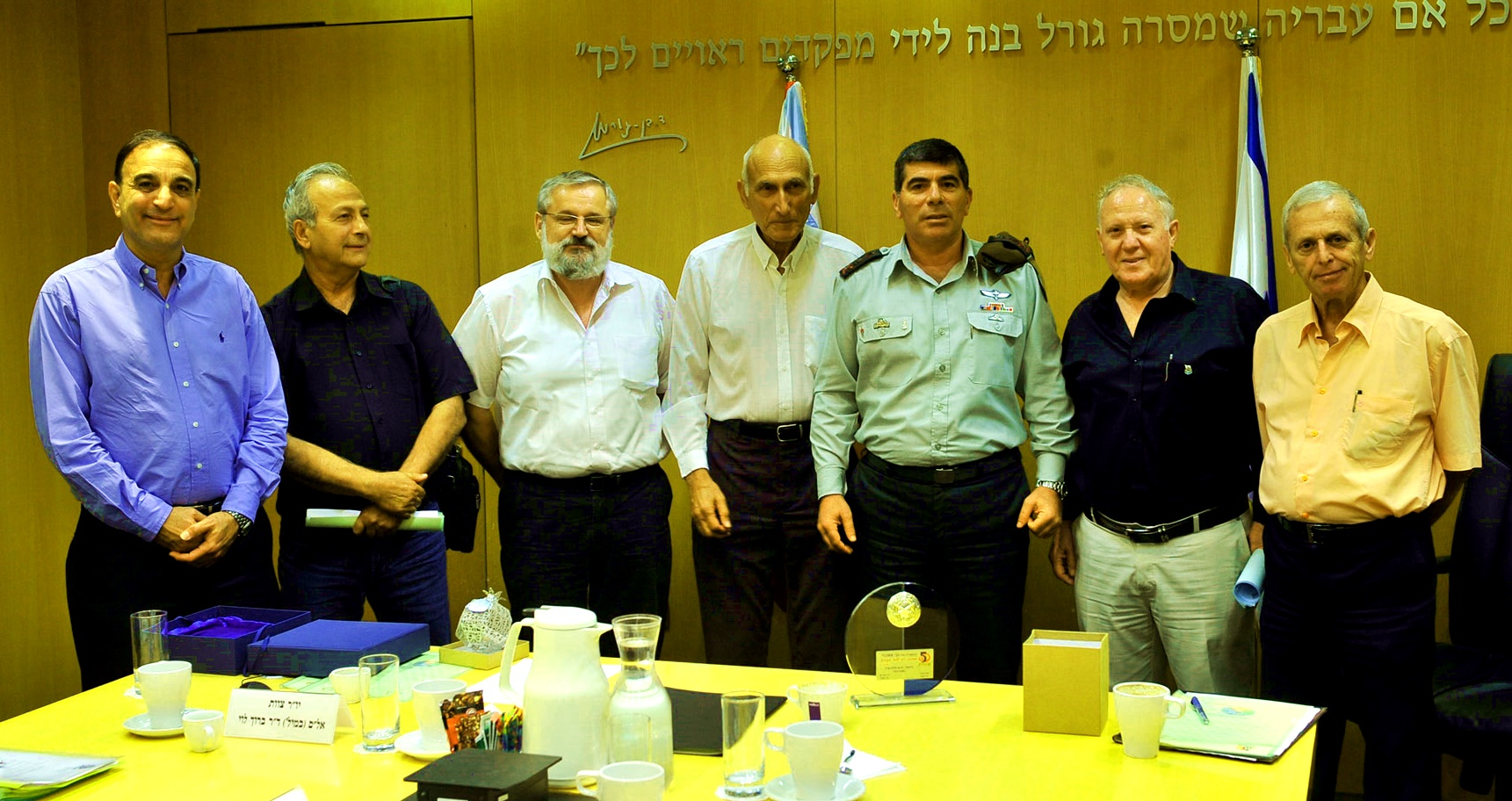 הנהלת עמותת גמלאי צה"ל "צוות" עם הרמטכ"ל גבי אשכנזי, 2010